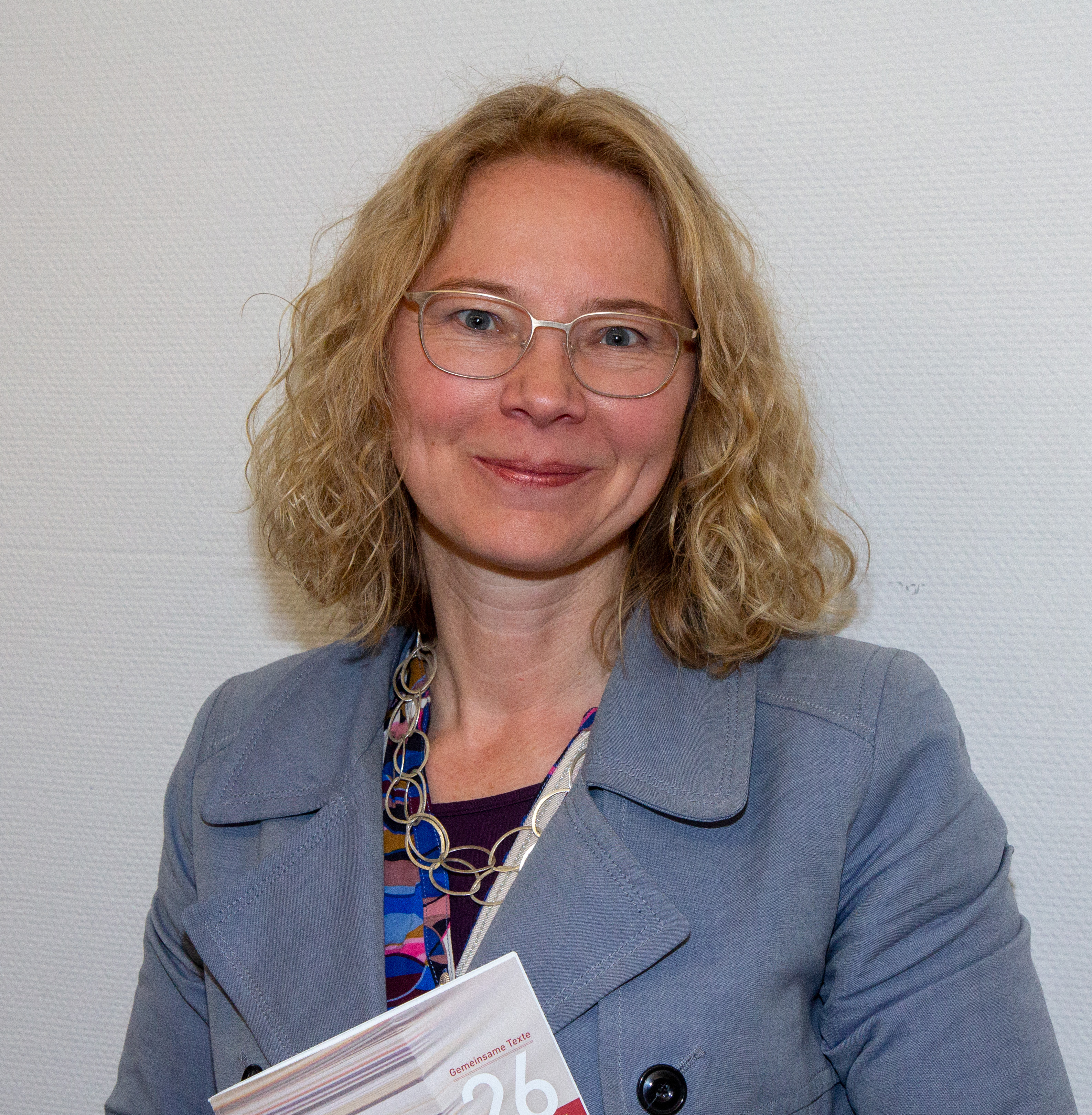 Tine Stein am 11. April 2019 in Berlin.